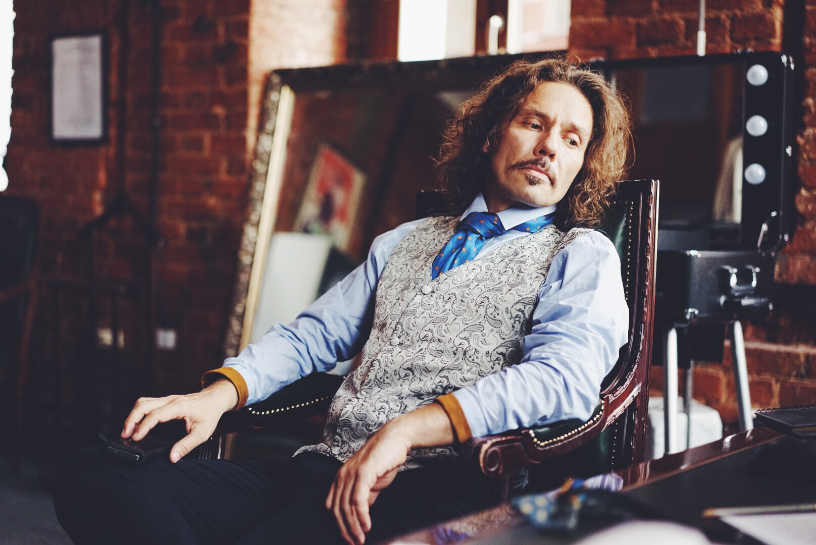 Александр Гаврилов, российский литературный деятель